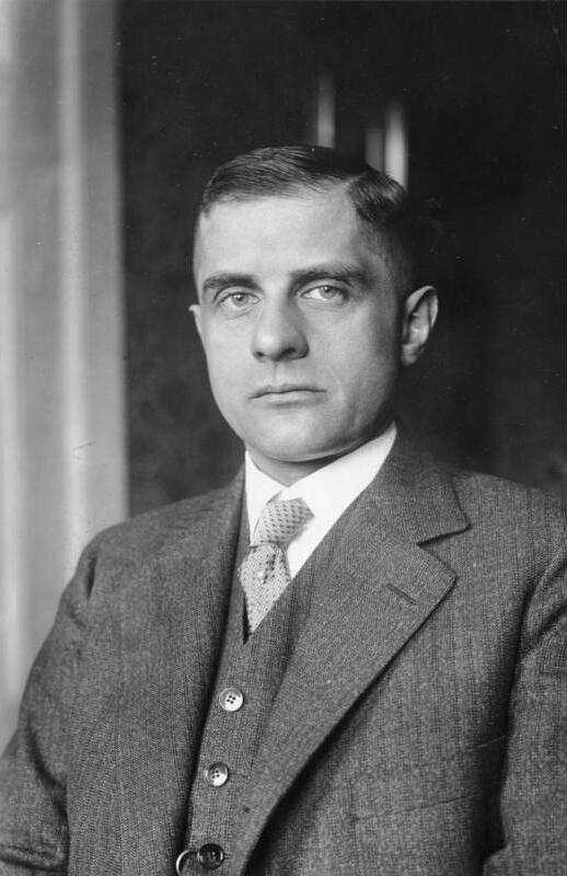 Dr. Friedrich Ernst Dr. Ernst, Ministerialdirektor [Porträt Dr. Friedrich Ernst] Abgebildete Personen: Ernst, Friedrich Dr.: Ministerialdirektor, Staatskommissar für Bankenkontrolle, Deutschland